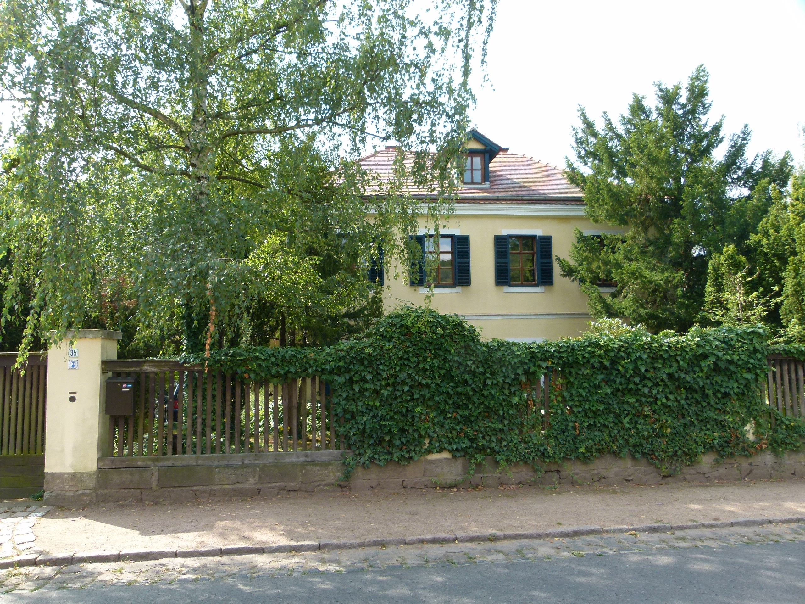 Denkmalgeschütztes Haus, Winzerstraße 35, Radebeul, Sachsen